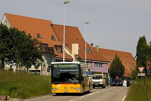 Röschenz: Fahrt nach Kleinlützel oder Roggenburg. Mercedes-Benz bus.